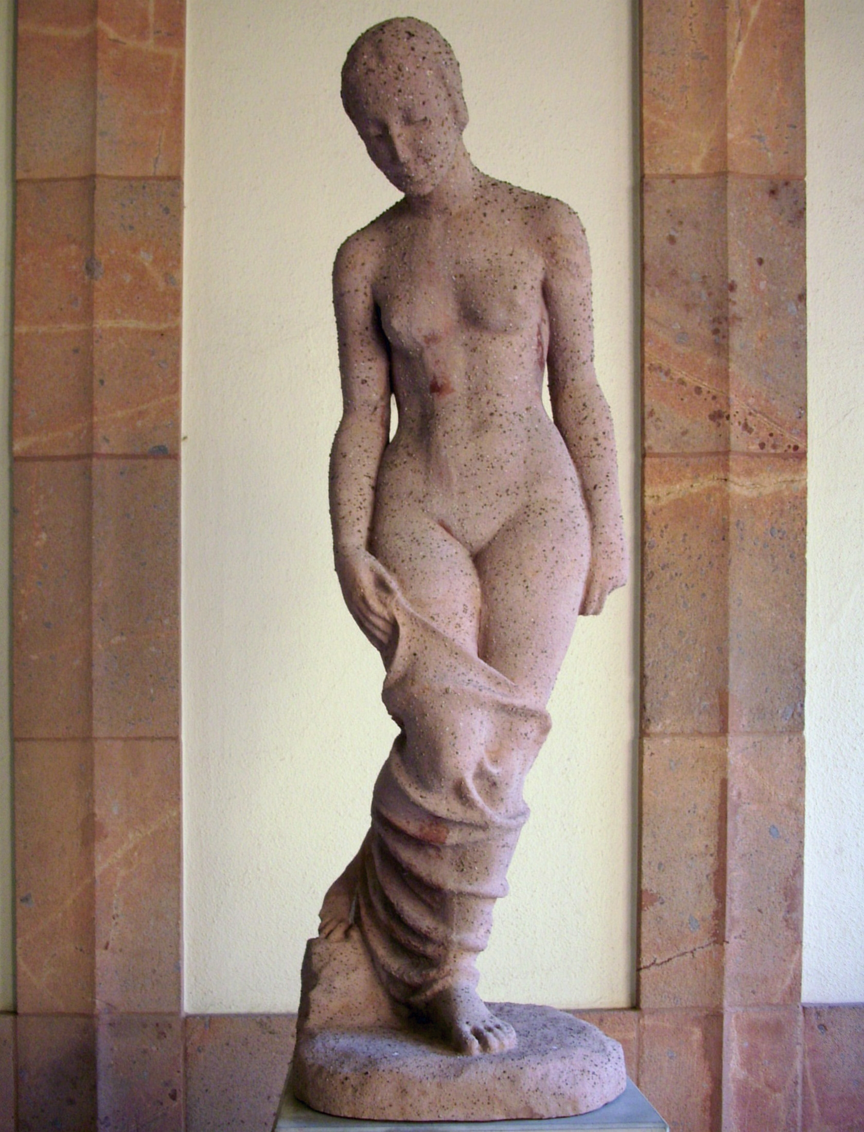 Alfred Thiele: Sinnende, 1929, Zementguss, jetzt: Grassimuseum Leipzig, Innenhof